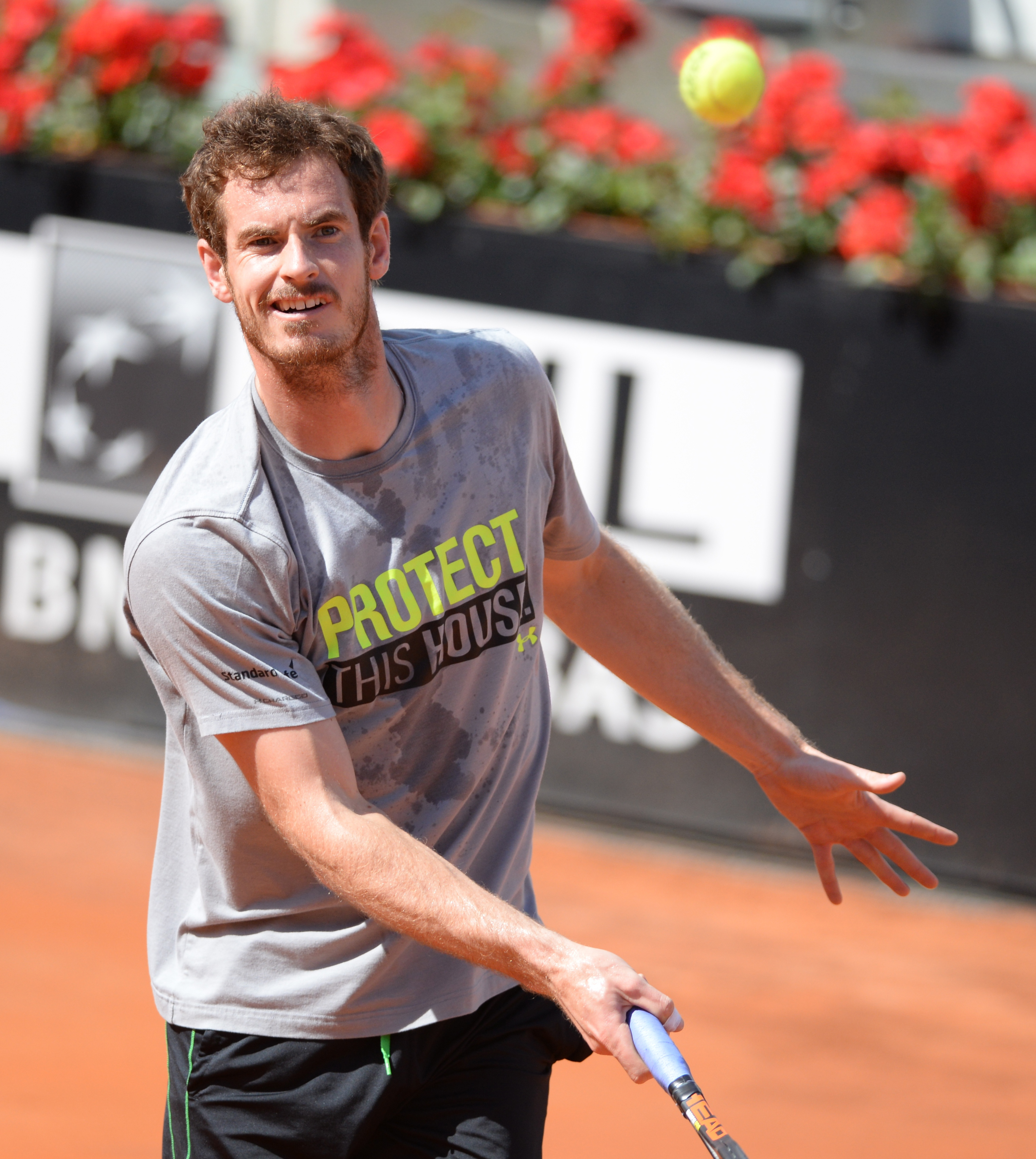 Andy Murray